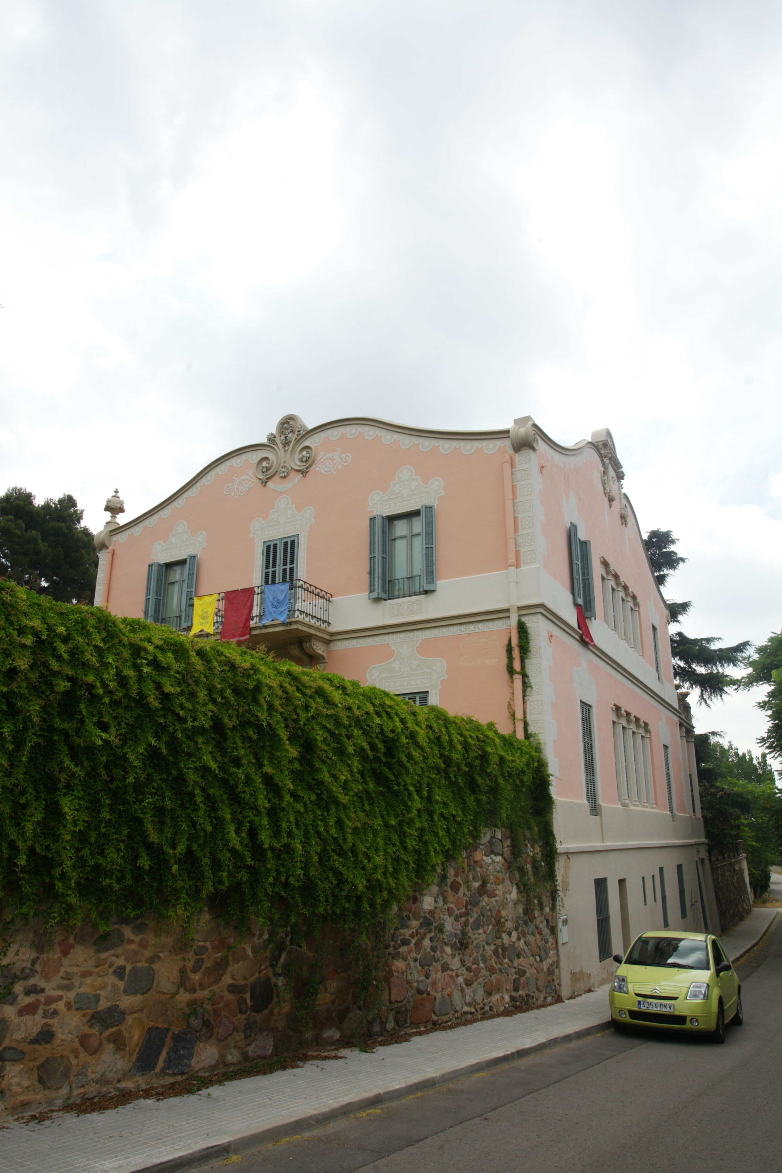 Casa Emili Sala Cortés (la Garriga) Object location41° 40′ 52.54″ N, 2° 17′ 21.16″ E